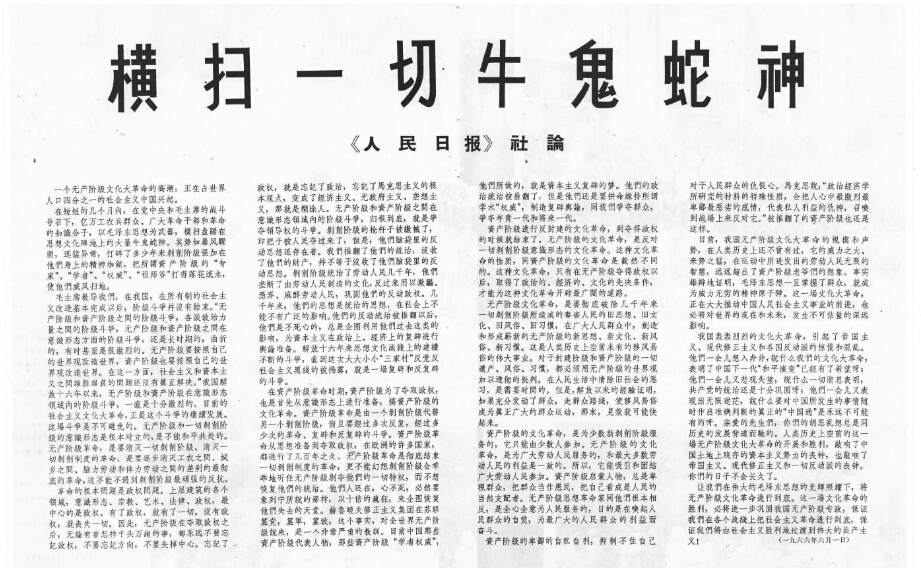 1966-08 1966年横扫一切牛鬼蛇神